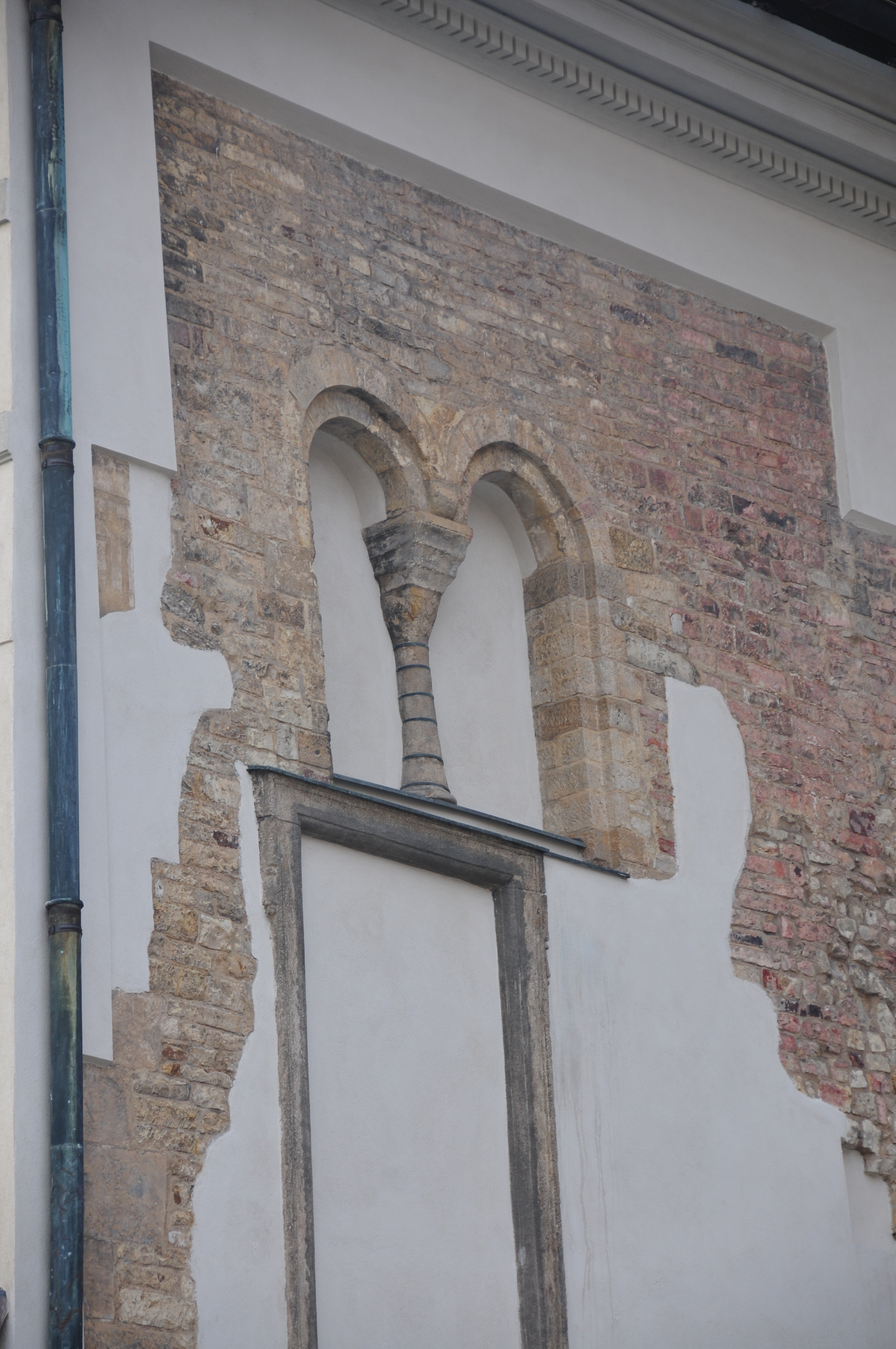 Prag